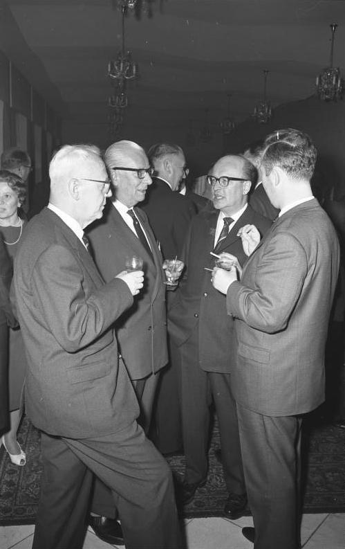 Finnische Staatsbeamte Empfang durch das Innen-Ministerium im Hotel Königshof